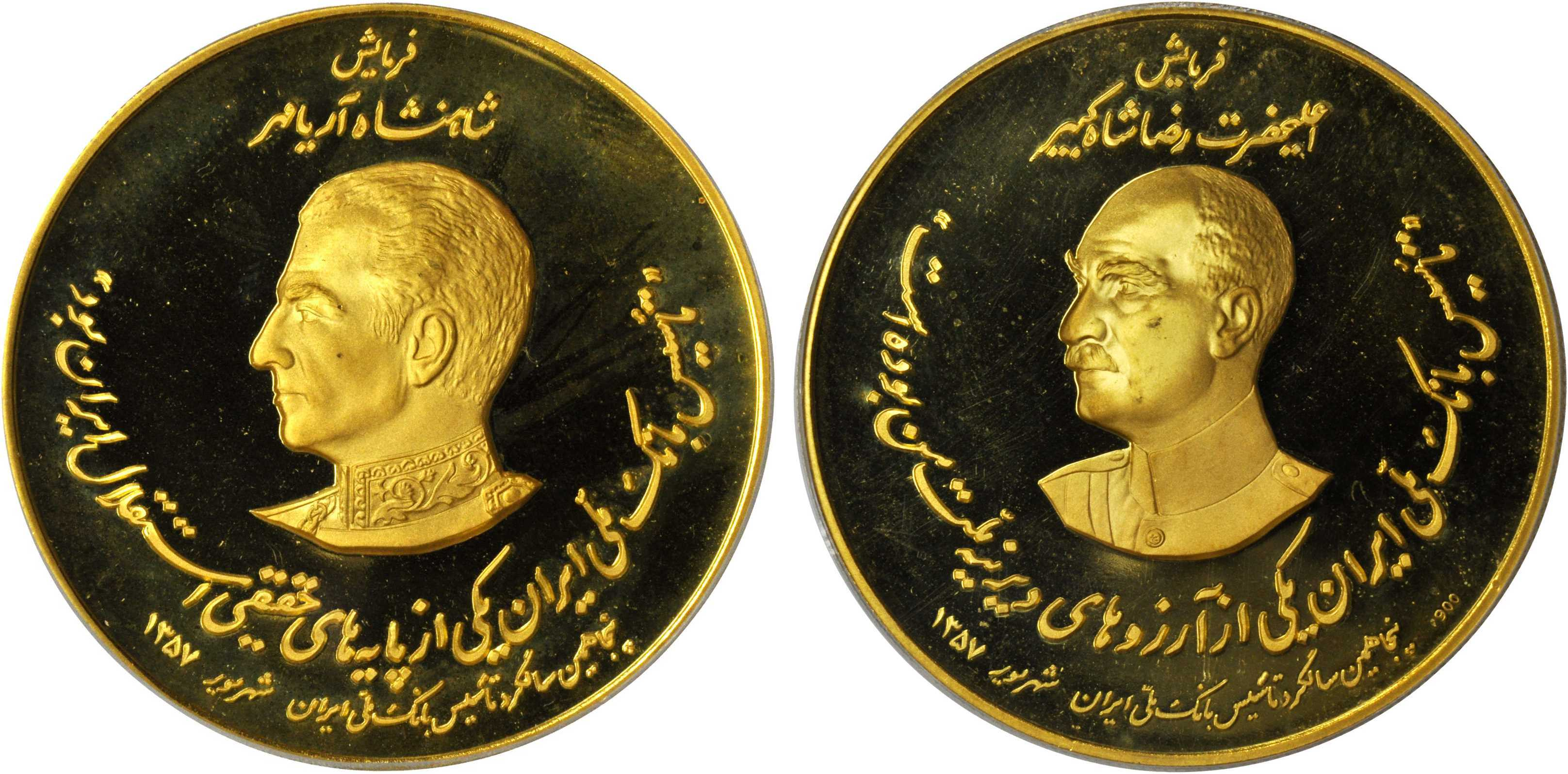 مدال طلای یادبود پنجاهمین سال تأسیس بانک ملّی ایران به وزن تقریبی ۴۰ گرم معروف به مدال فرمایش؛ با جملاتی از رضا شاه و محمدرضا شاه پهلوی در خصوص تأسیس این بانک